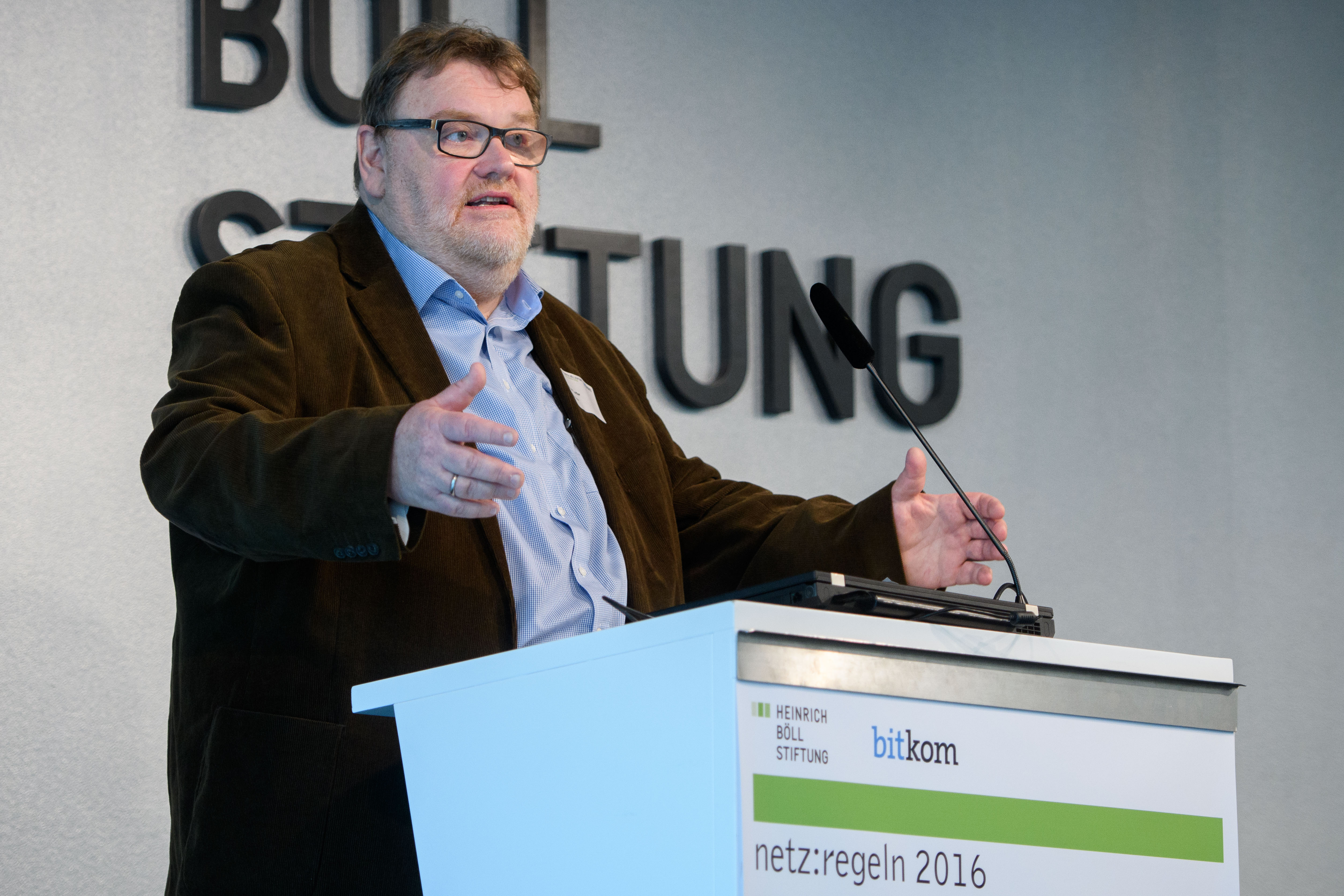 Wolf Lotter (Journalist und Mitbegründer brand eins) Foto: stephan-roehl.de